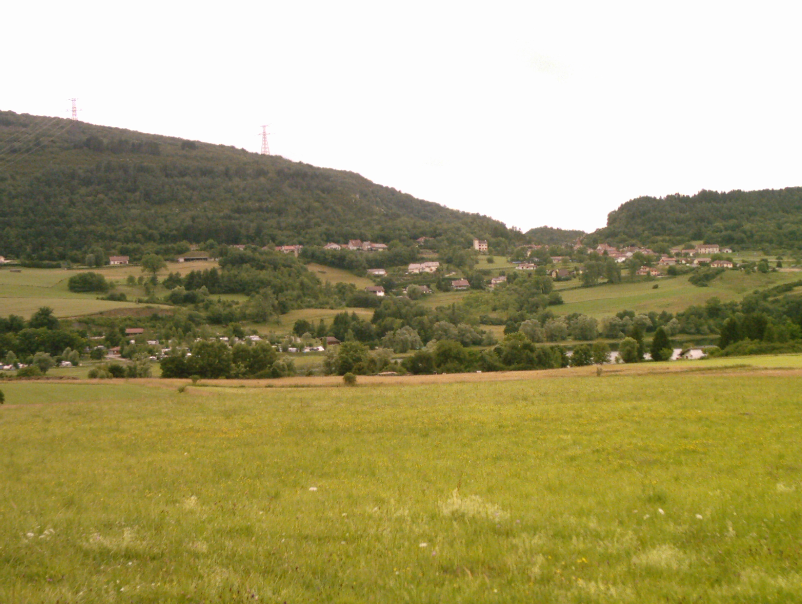 Vue général de Matafelon (Ain, FRANCE)